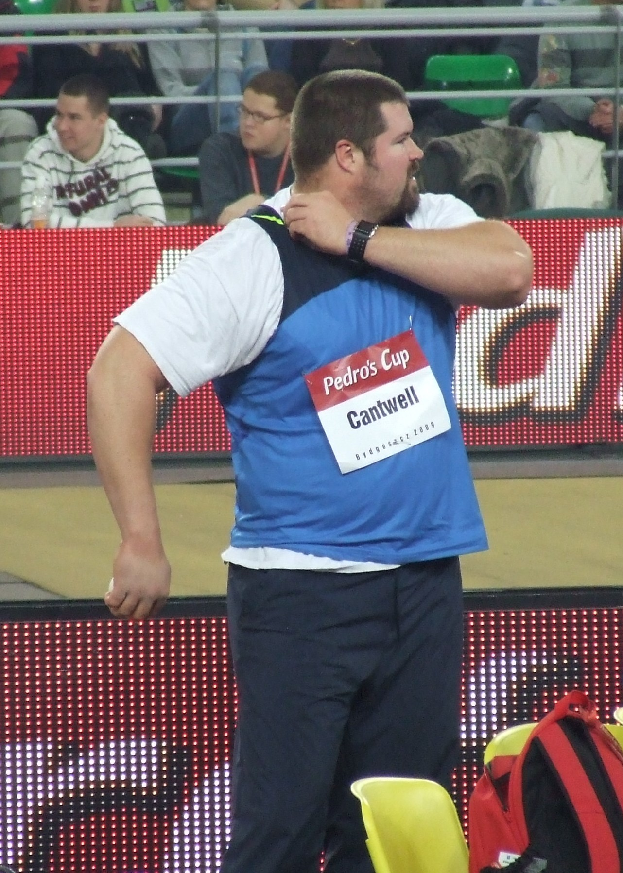 Amerykański kulomiot Christian Cantwell, Pedro's Cup Bydgoszcz 2009